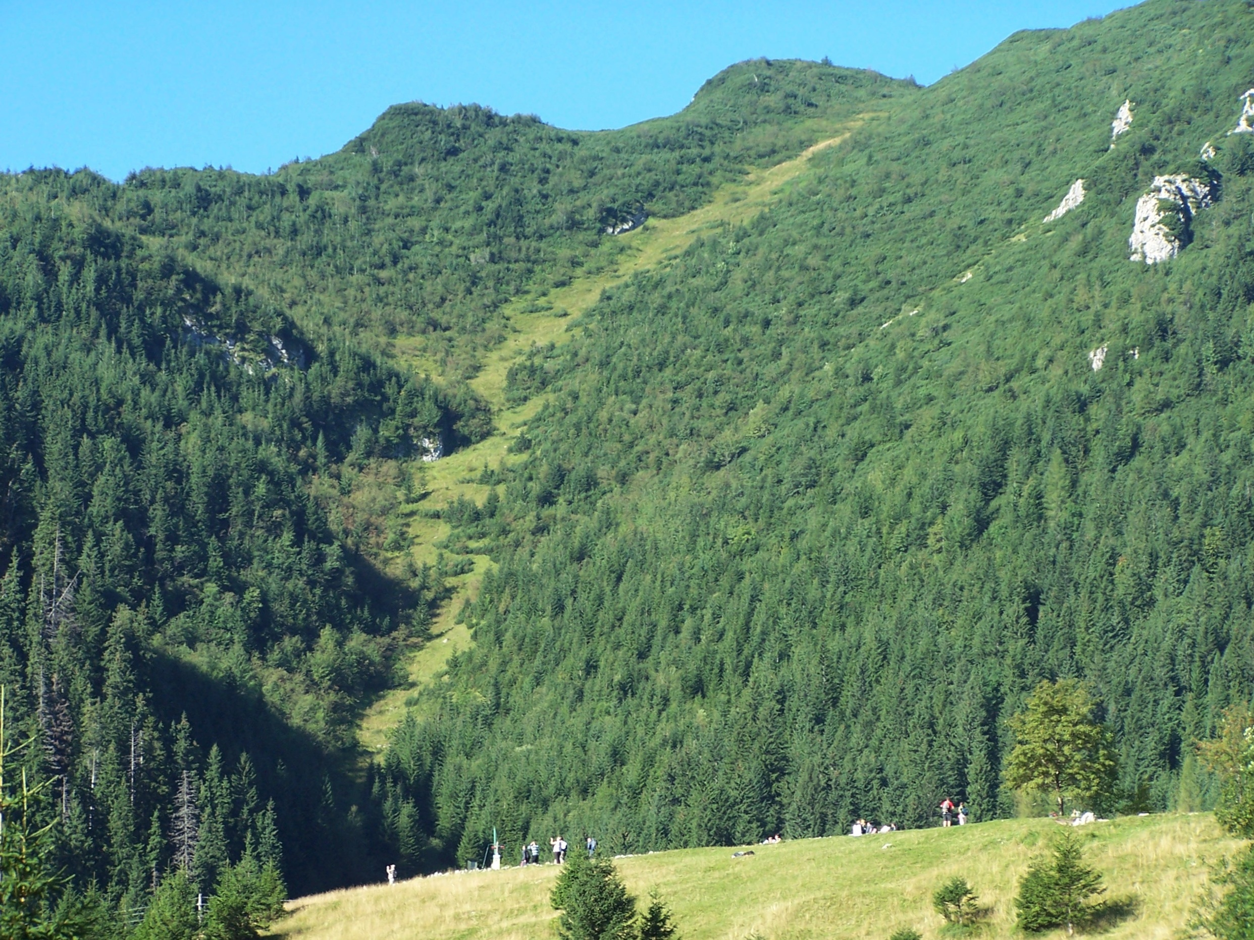 Kalackie Koryto. Widok z Kalatówek